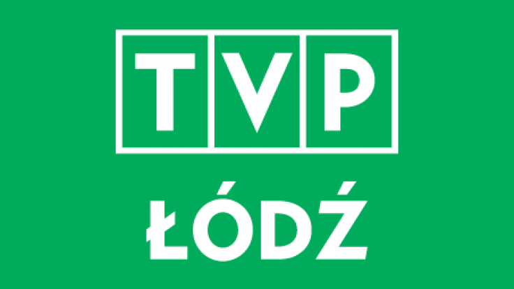 Logo TVP Łódź od 1 września 2013 roku